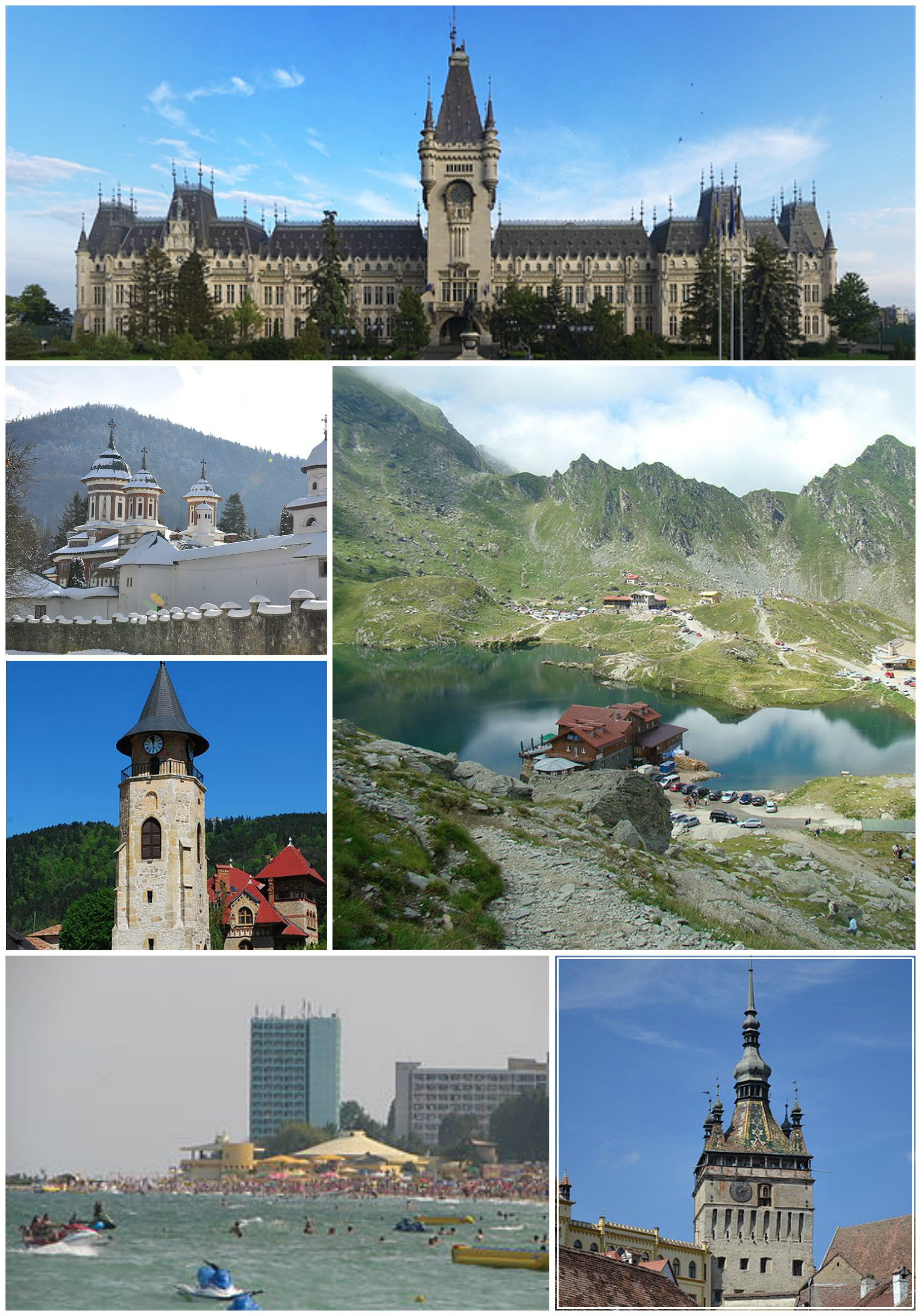 Colaj cu imagini din România, pozele aparţin wikimedia commons